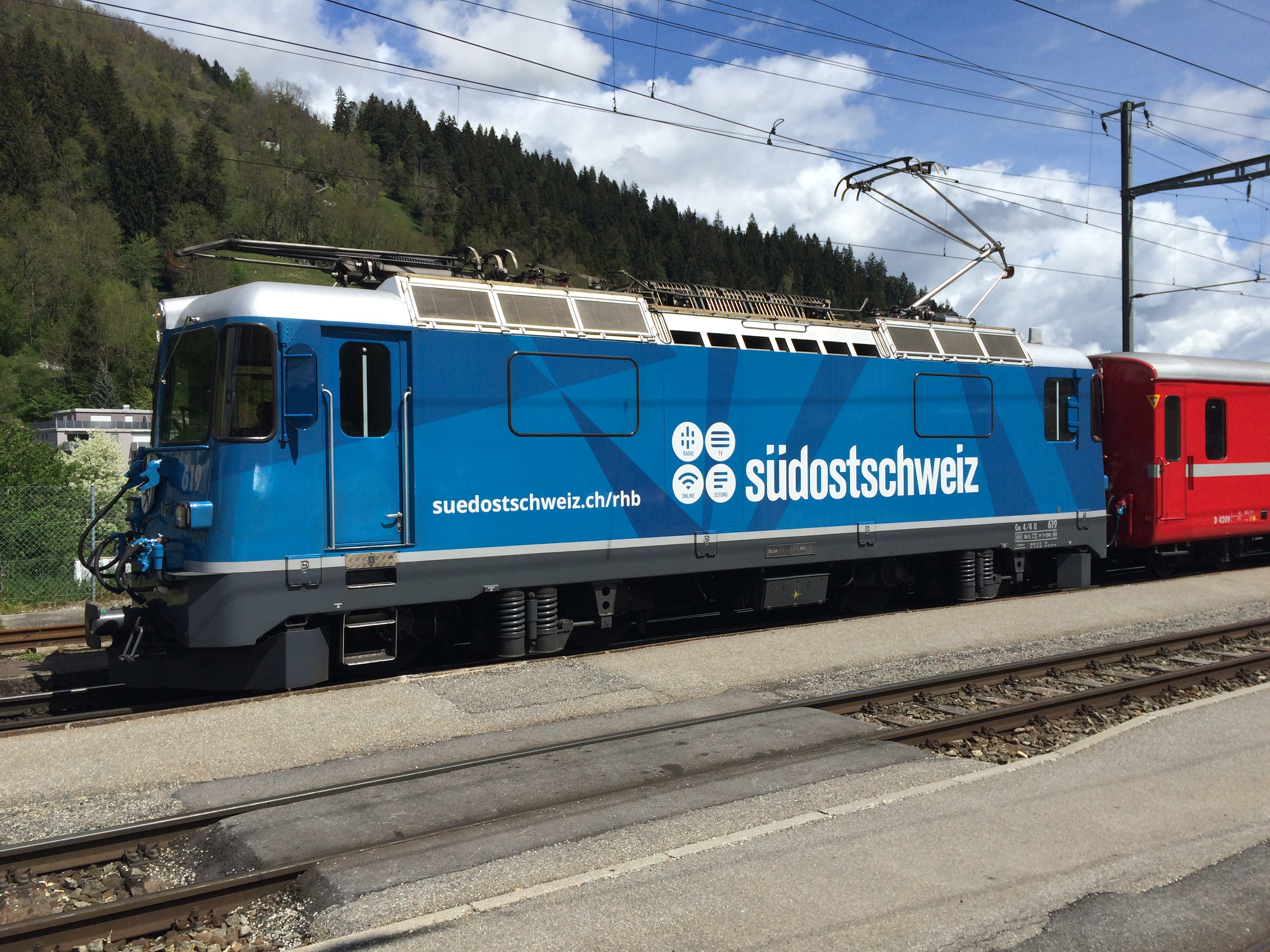 Mauer beim Aufgang zum Museum Rietberg